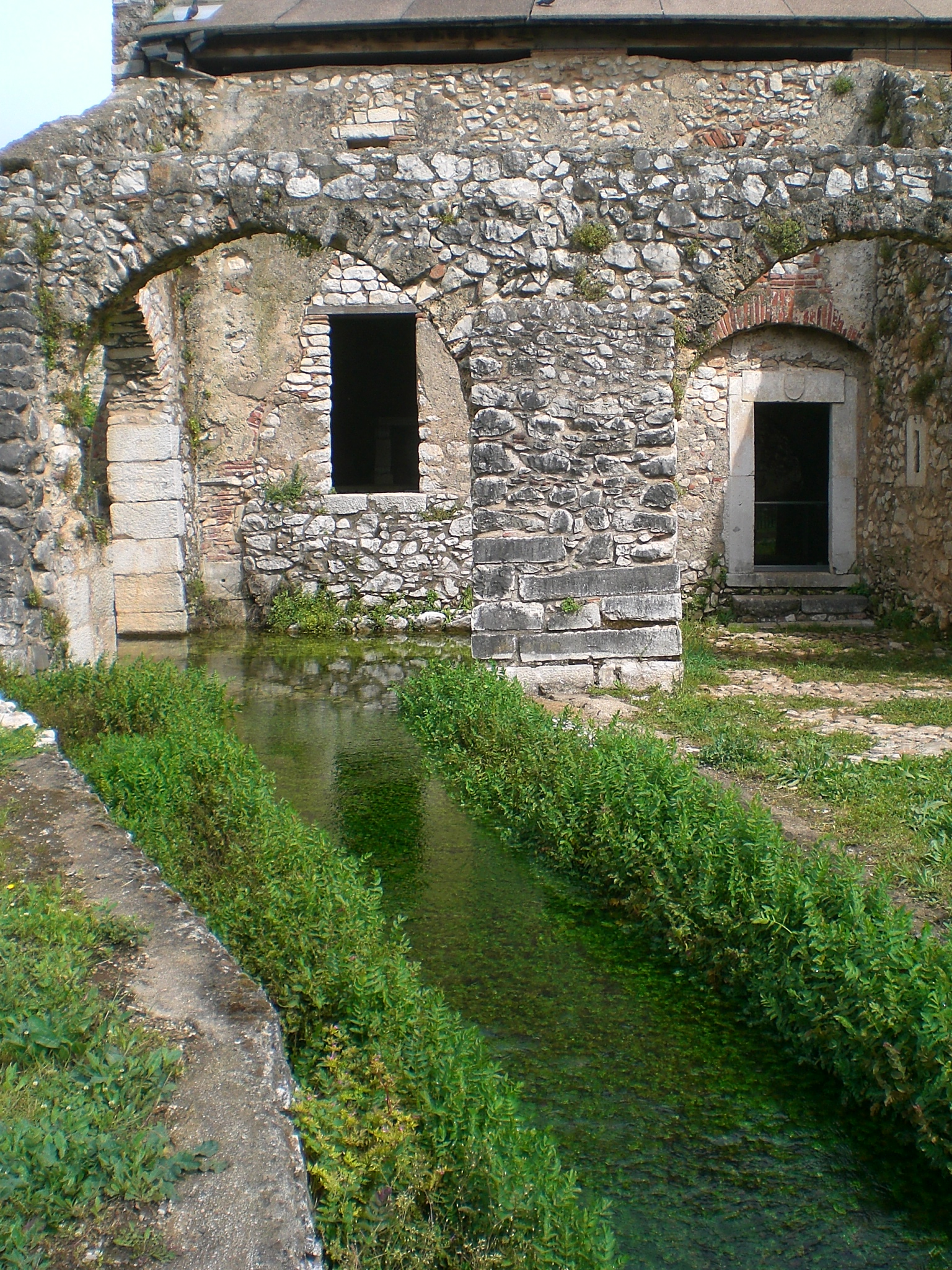 Battistero di Marcelliano a Sala Consilina.